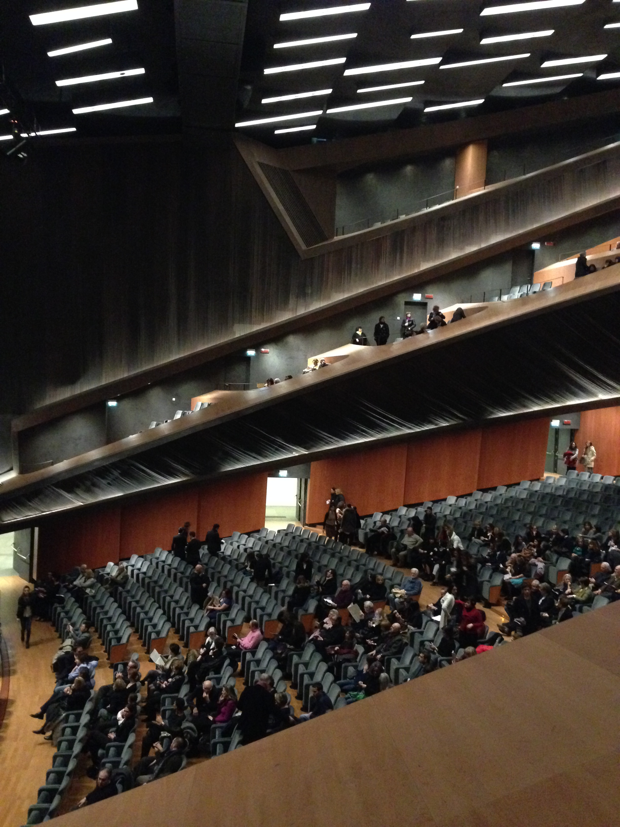 Nuovo teatro dell'opera Firenze. Sala